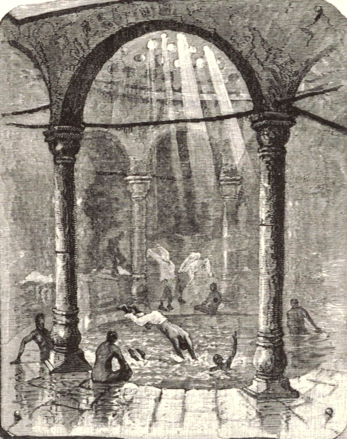 La Terre Sainte. Son histoire, ses souvenirs, ses sites, ses monuments / par Victor Guérin,... P.314